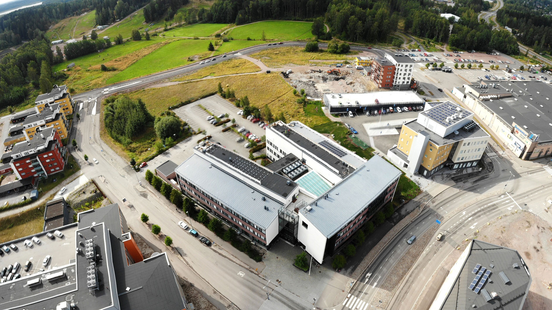 Haaga-Helia Porvoo Campus